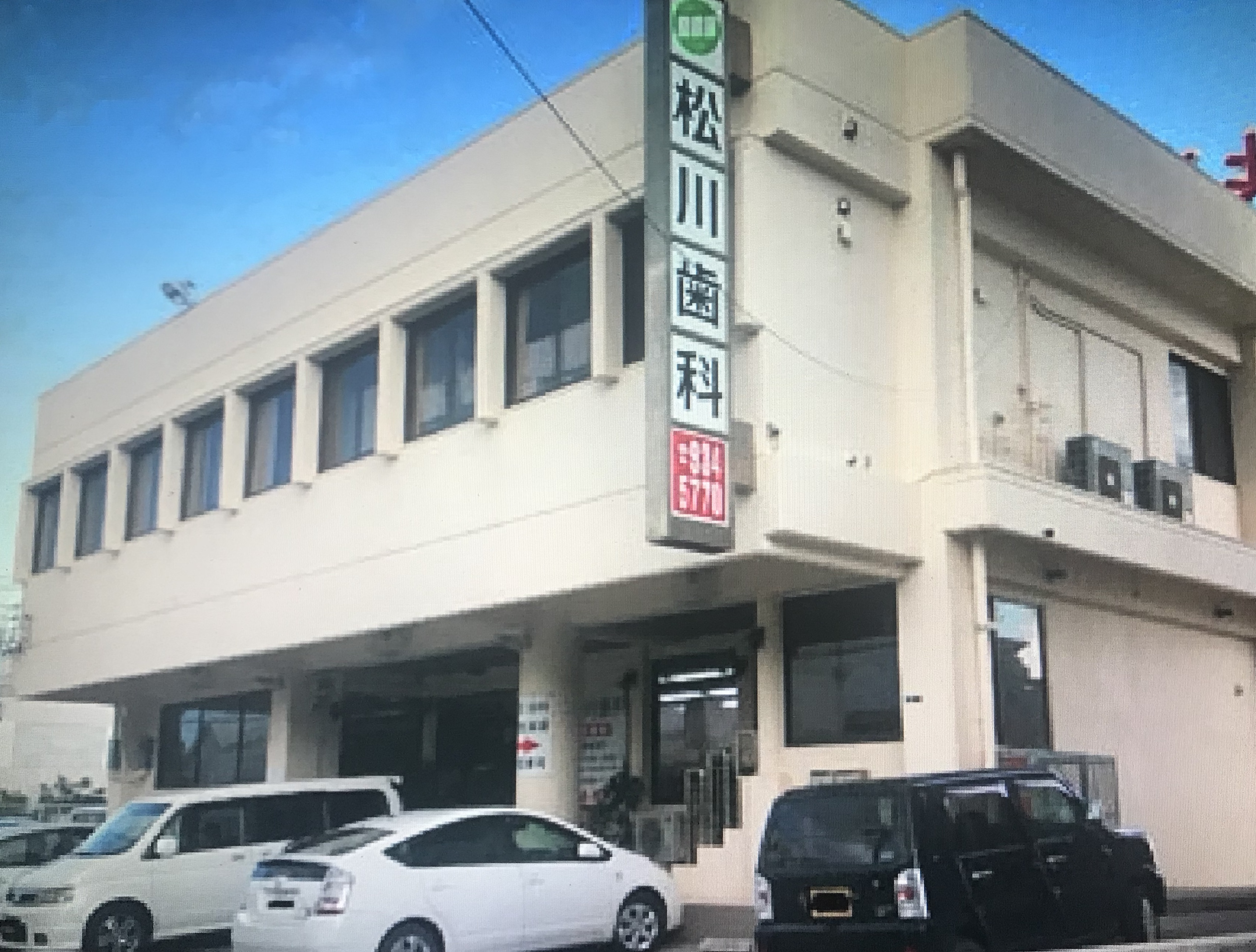 沖縄の松川歯科医院です